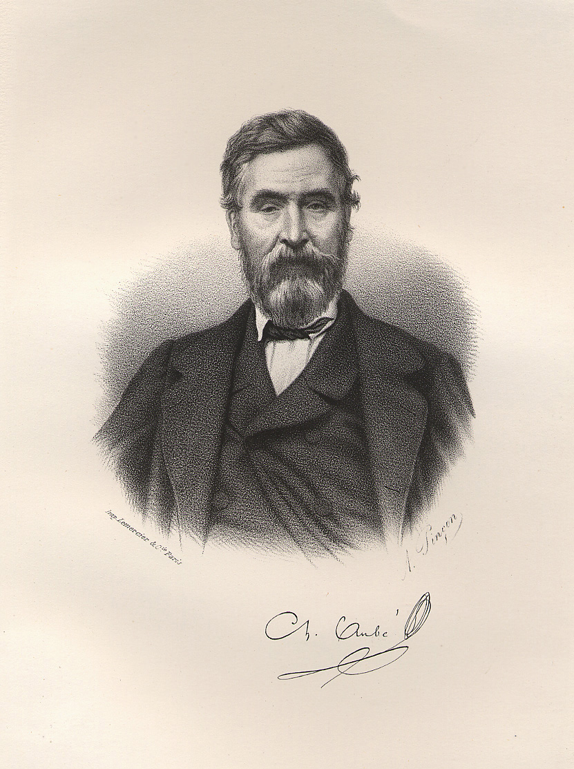 Portrait du Dr. Charles Aubé co-fondateur de la Société entomologique de France (SEF).